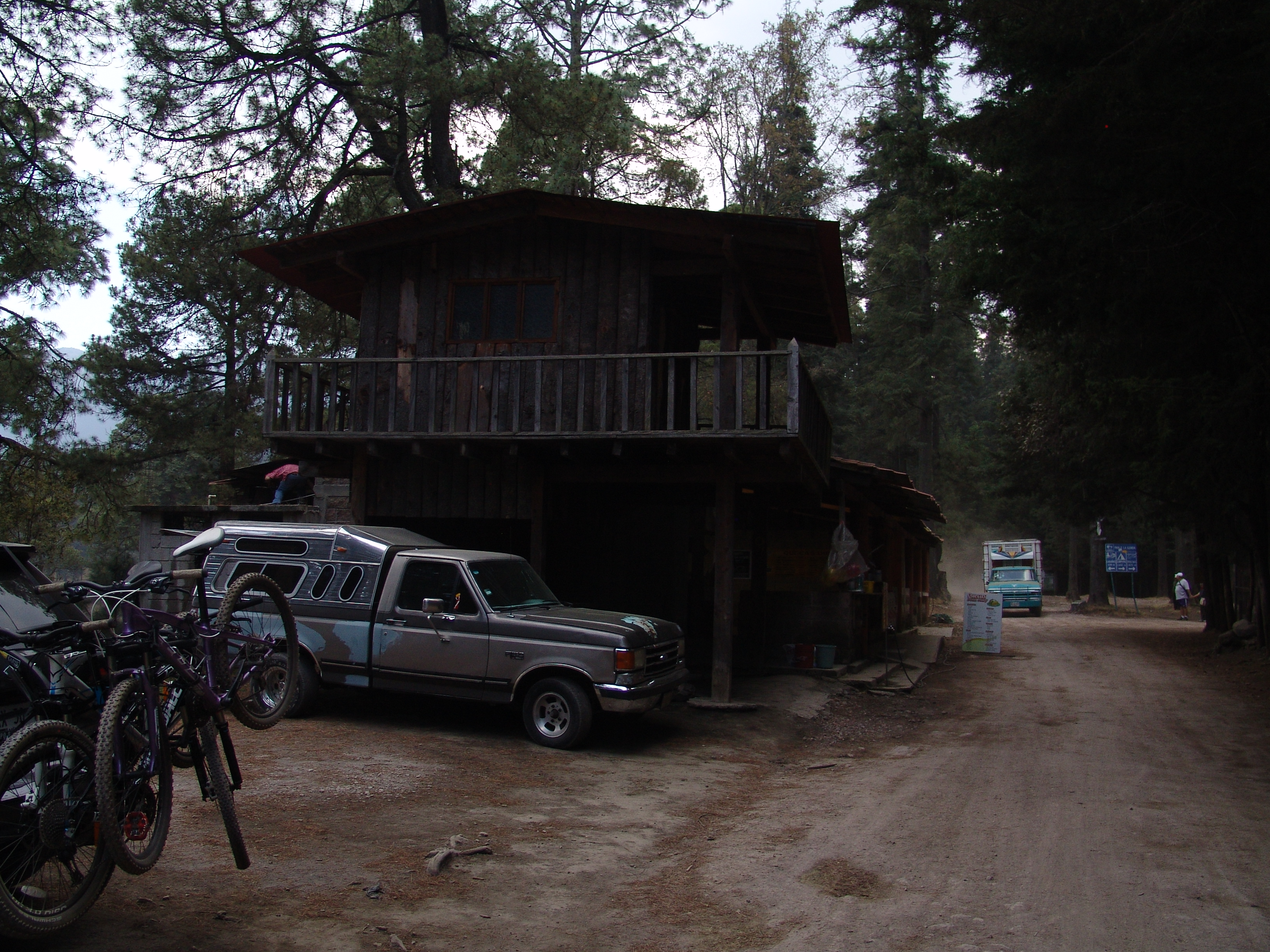 .Paisaje del Ajusco. Parque Ejidal San Nicolás. Carretera Picacho Ajusco Km 11.5, (Tlalpan, Distrito Federal).